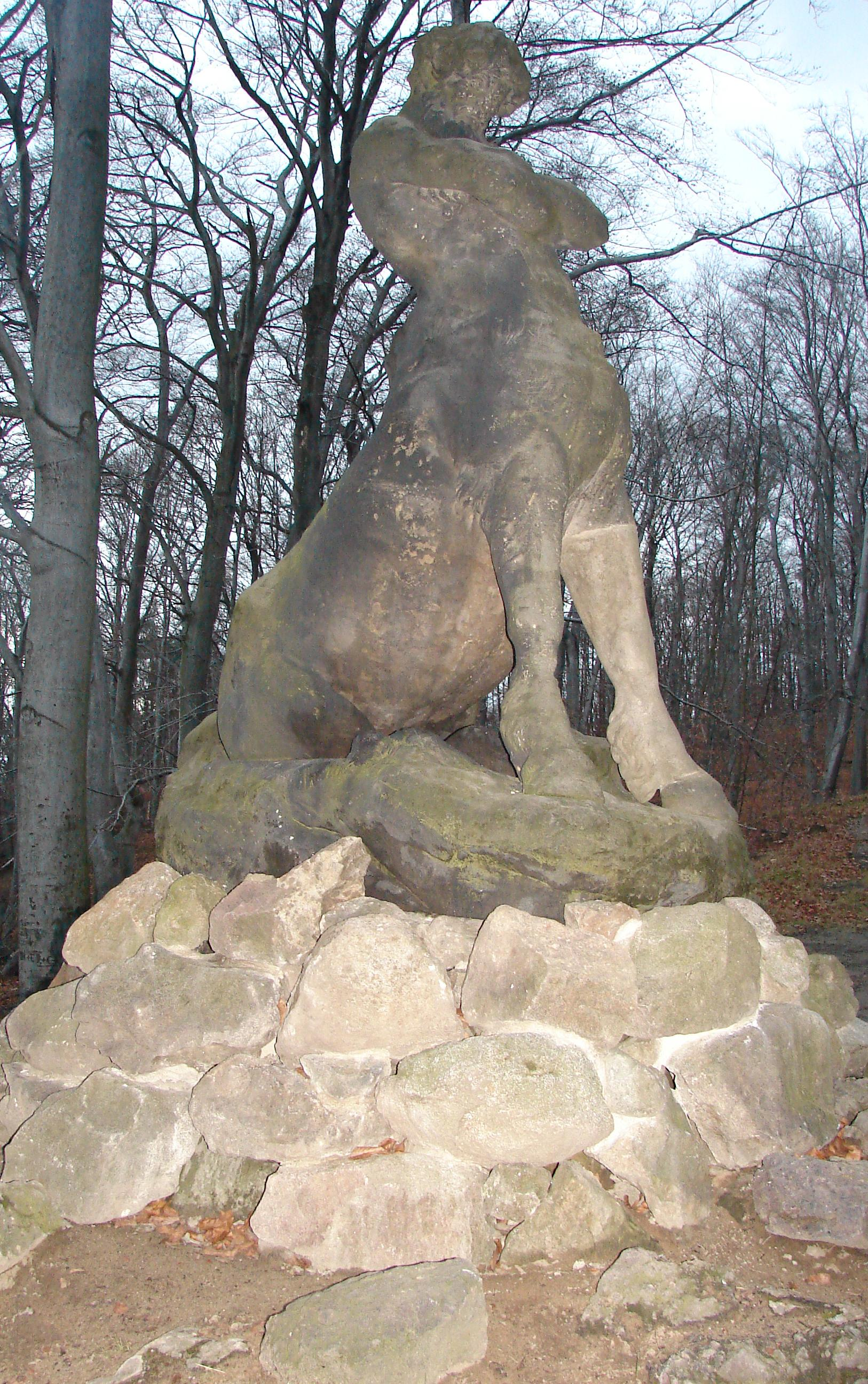 Sandstein-Kentaur Cheiron von O. Petrenz nahe der Mordgrundbrücke in Dresden-Weißer Hirsch